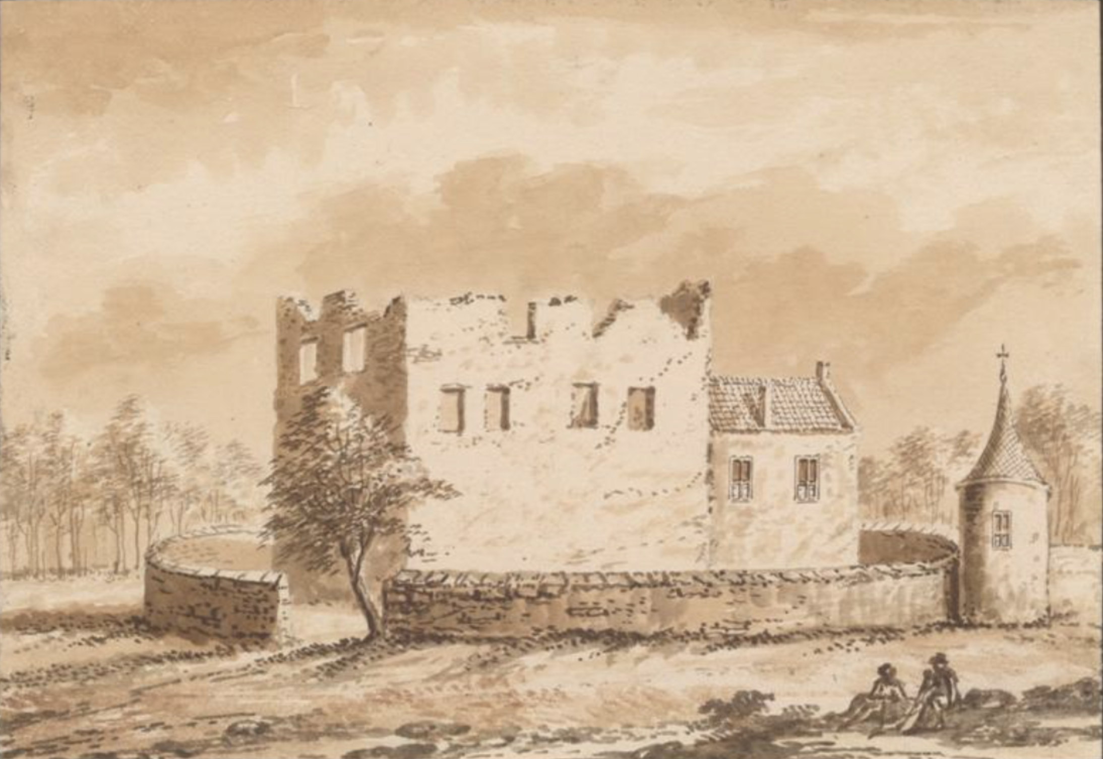 tekening van de ruïne van het klooster Mariëngaarde door Abraham Rademaker